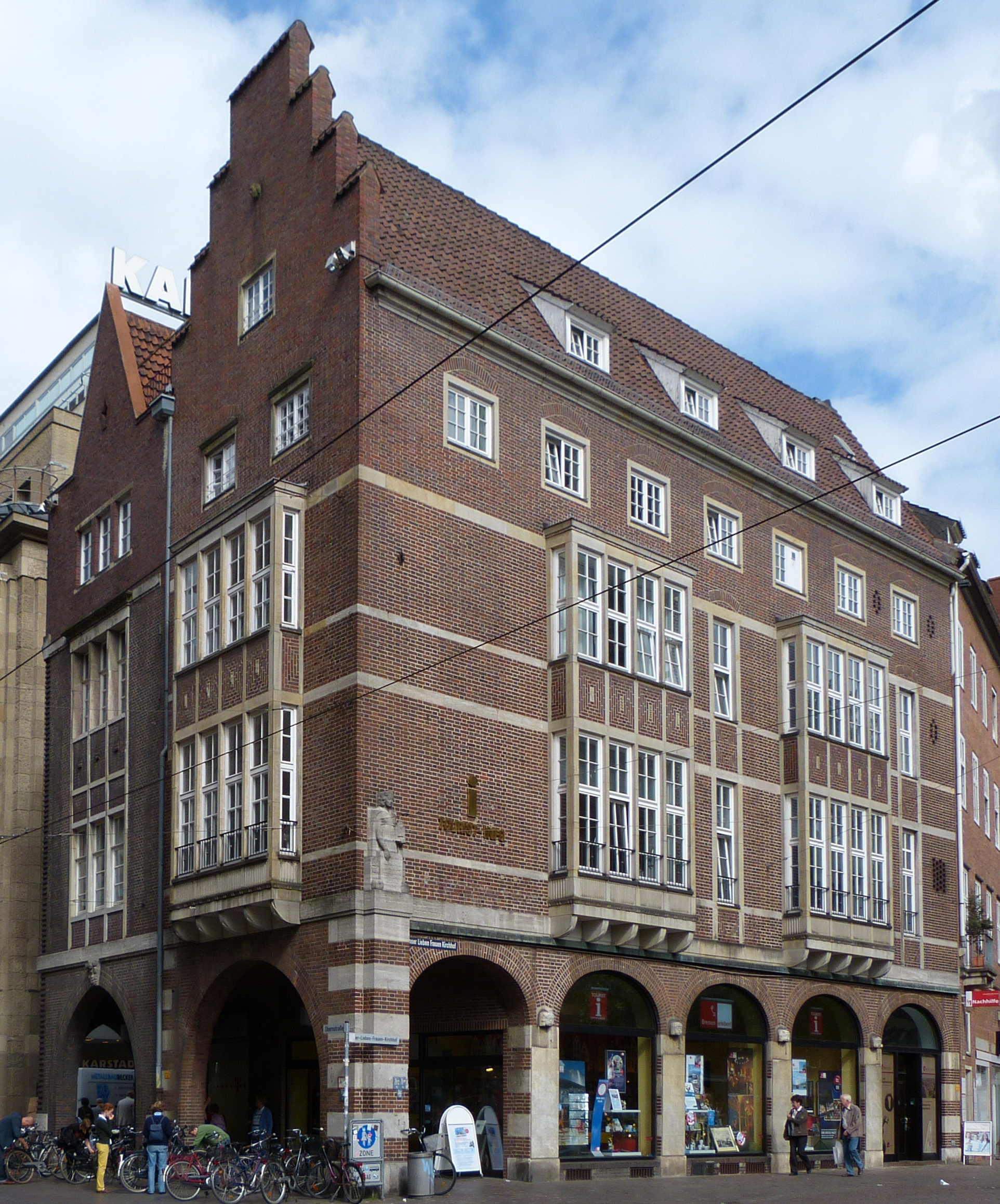 Haus Rohlandseck in Bremen, Unser Lieben Frauen Kirchhof 26Das abgebildete Objekt ist ein geschütztes Kulturdenkmal in der Freien Hansestadt Bremen, mit der Nr. 1179 beim Landesamt für Denkmalpflege registriert.